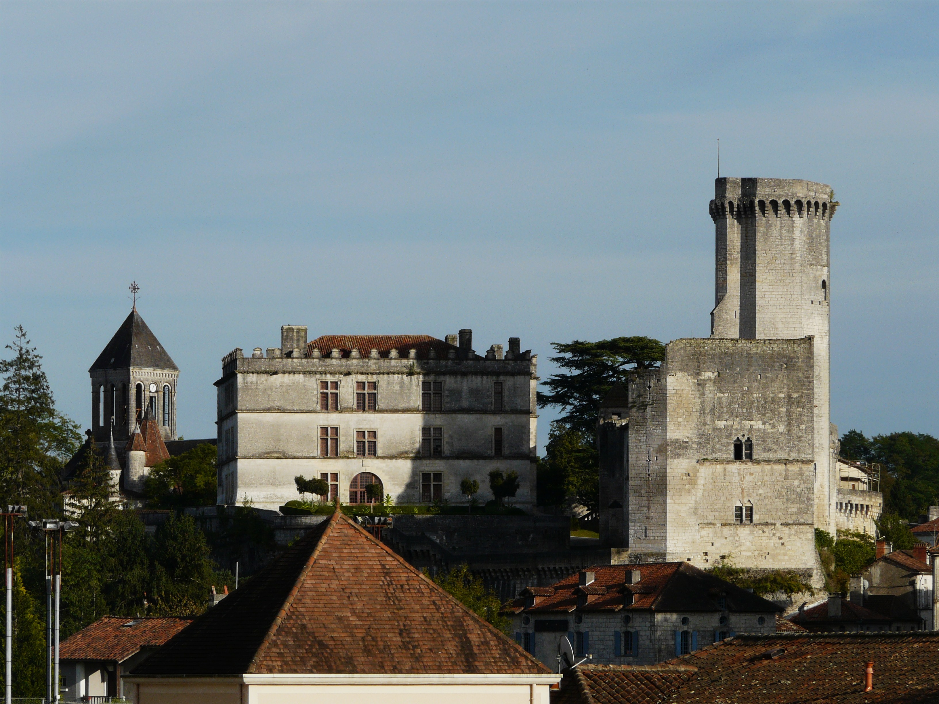 Au-dessus des toits du faubourg Notre-Dame, le clocher de l'église, le Pavillon renaissance et le donjon de la forteresse médiévale, Bourdeilles, Dordogne, France